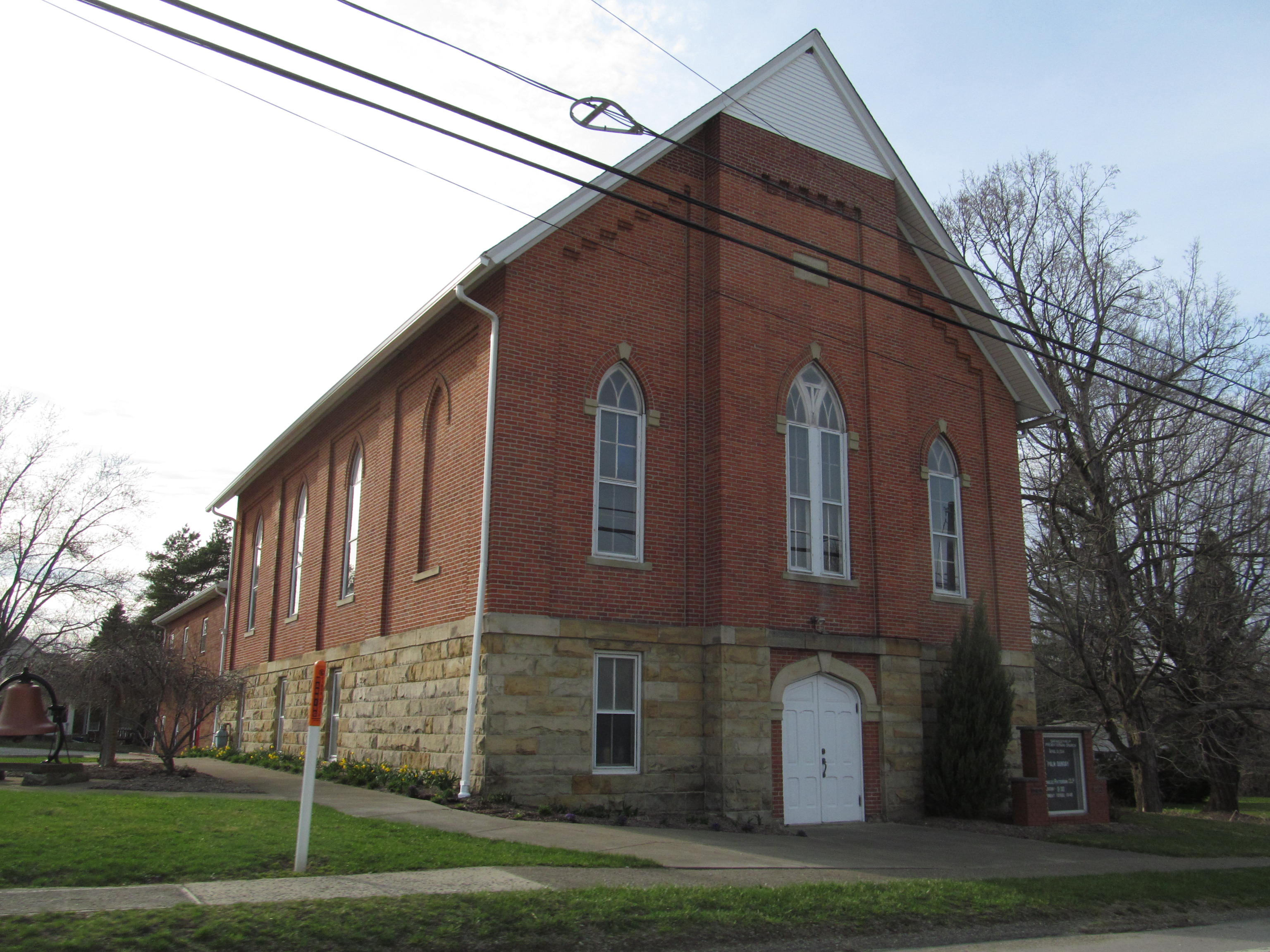 Sheakleyville, Pennsylvania Sheakleyville, Pennsylvania